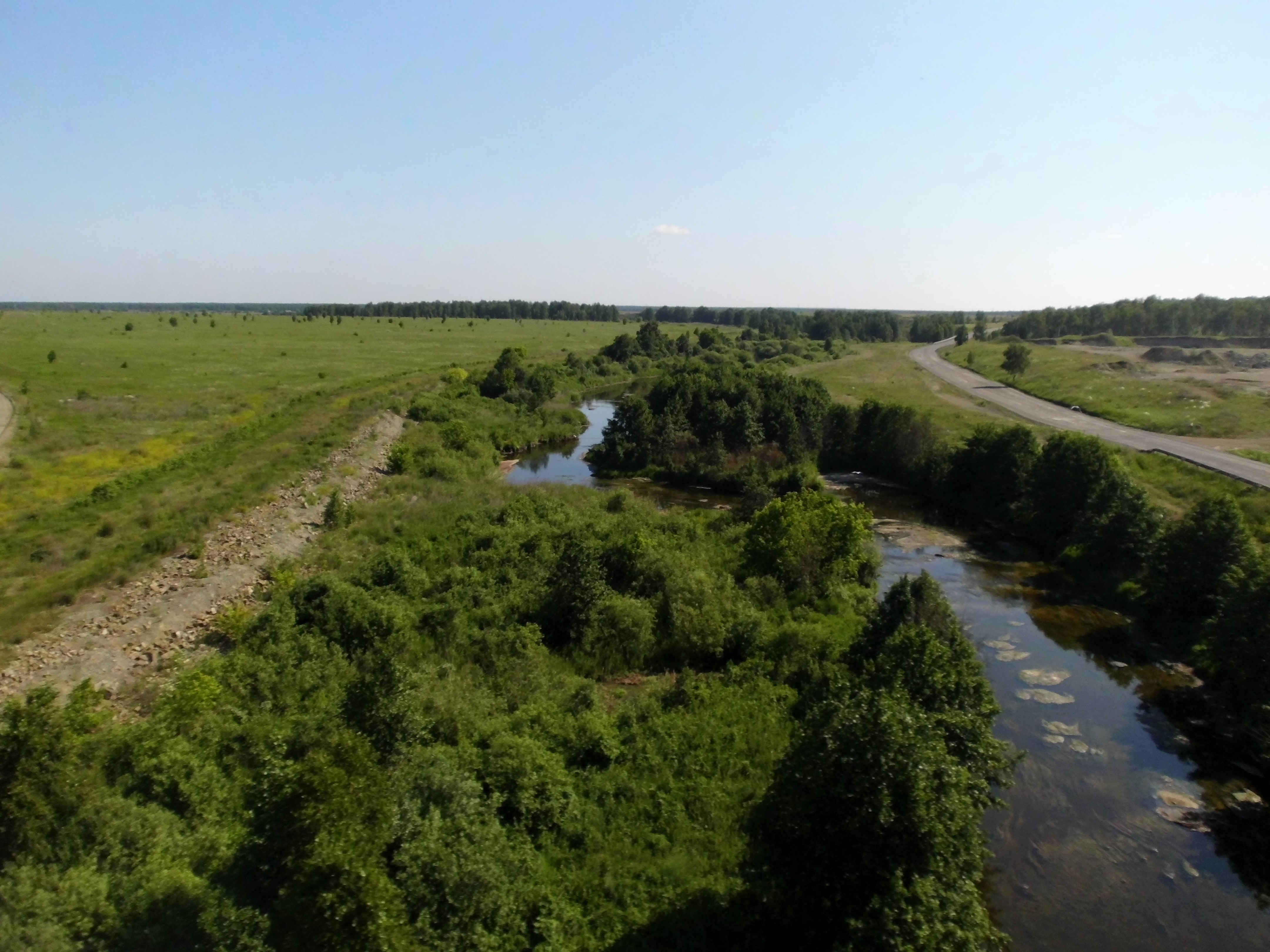 Река Теча возле посёлка Муслюмово. Вид в восточном направлении ниже по течению от железнодорожного моста. Справа вдоль правого берега реки проходит автодорога 75К-206 "Железнодородная станция Муслюмово - Саккулово - Подъезд к Екатеринбургу автодороги М5 "Урал"".